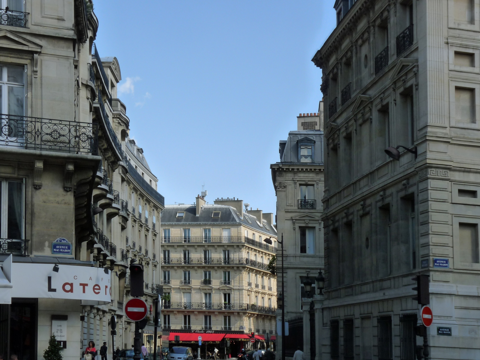 La rue de Tilsitt à Paris, vue de l'avenue Mac Mahon. Au fond l'intersection avec l'avenue de Wagram.